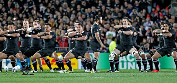 COUPE DU MONDE DE RUGBY 2011 NOUVELLE ZELANDE ARGENTINE